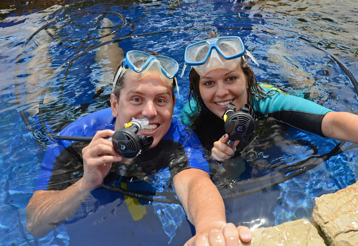 Palma Aquarium - Bajo el agua